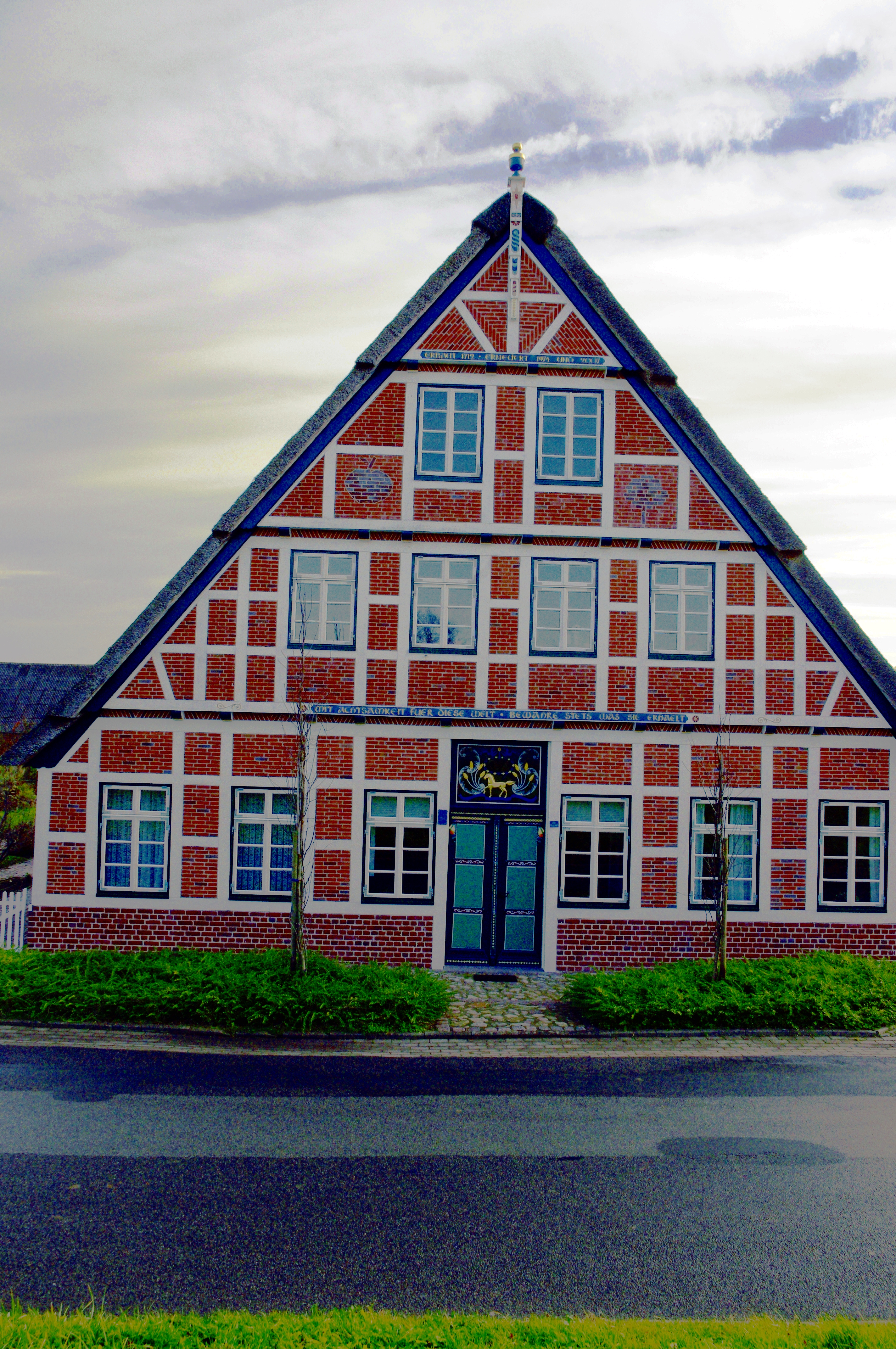 Fachwerkhaus in Klein-Hove, Jork